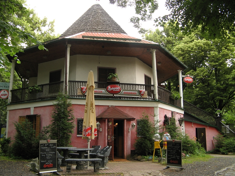 Pavilón Tuppelburg, Mstišov